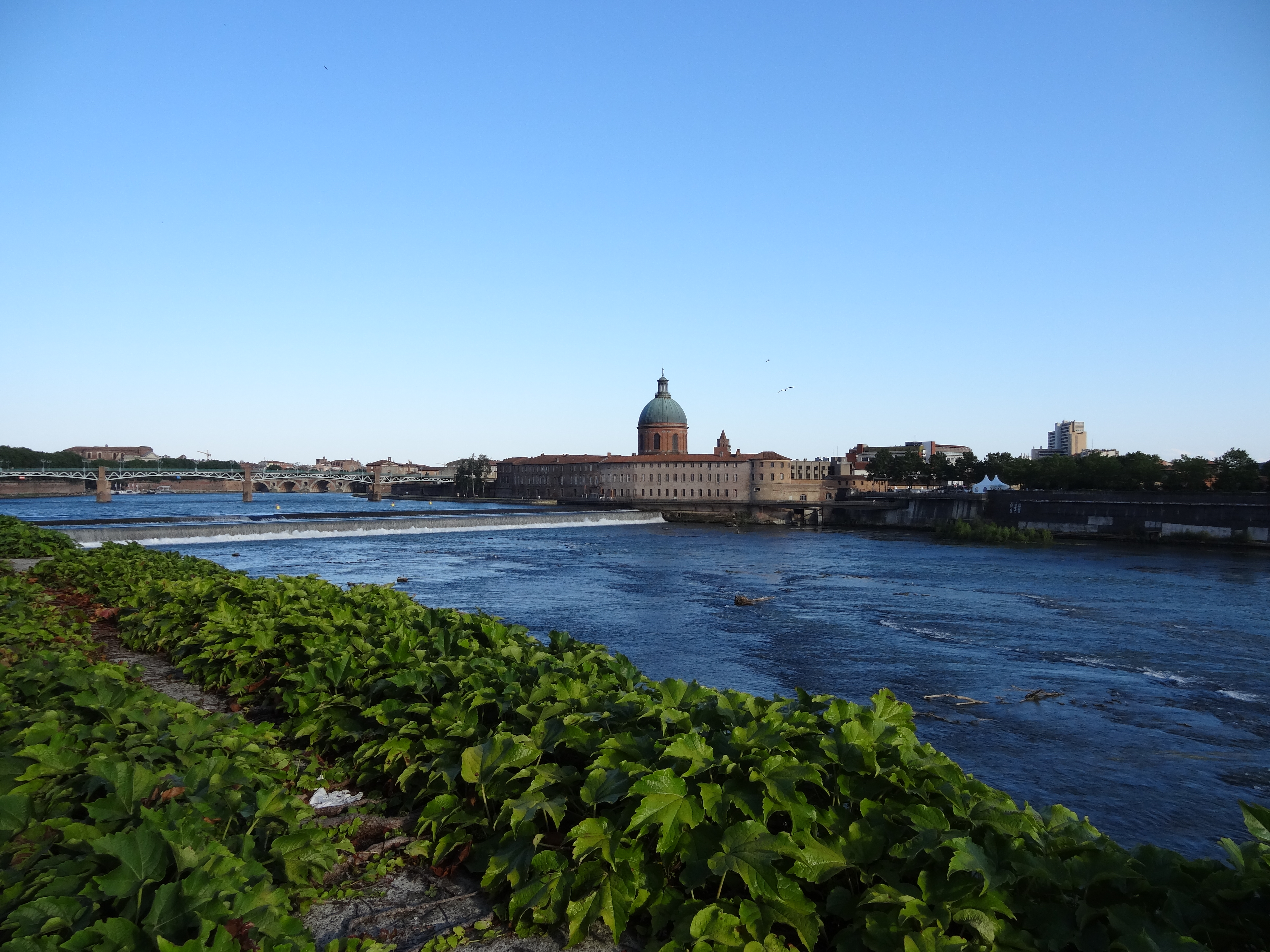 Vue sur la Garonne et l'Hôpital de la Grave depuis le Bazacle, Toulouse .